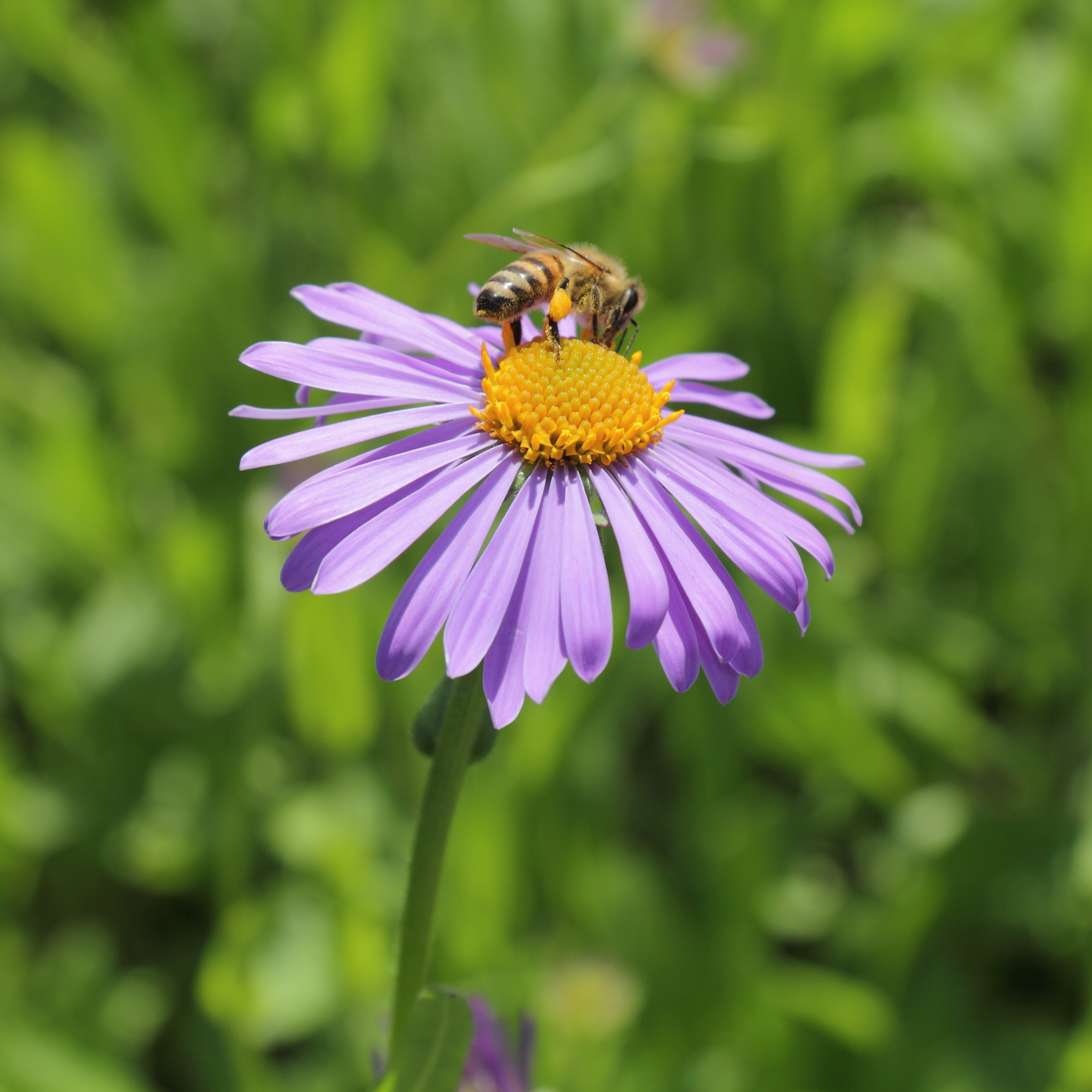 Aster tongolensis, identifierad med hjälp av befintlig skylt vid Bergianska trädgården.